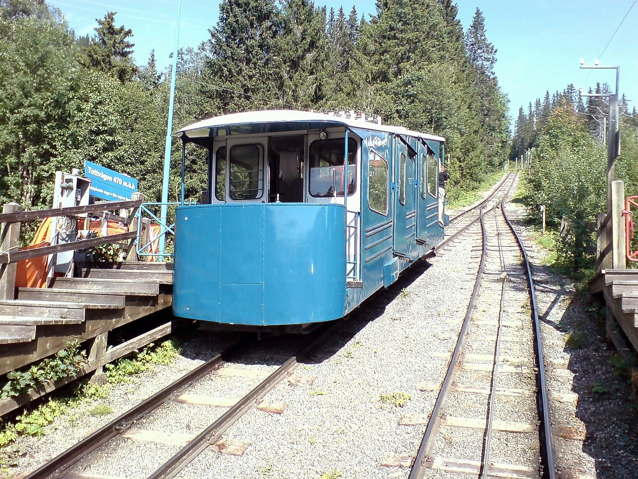 Åre bergbana